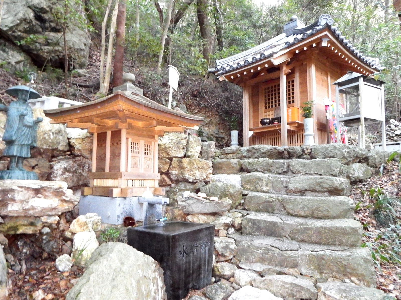 大日寺爪彫り薬師堂